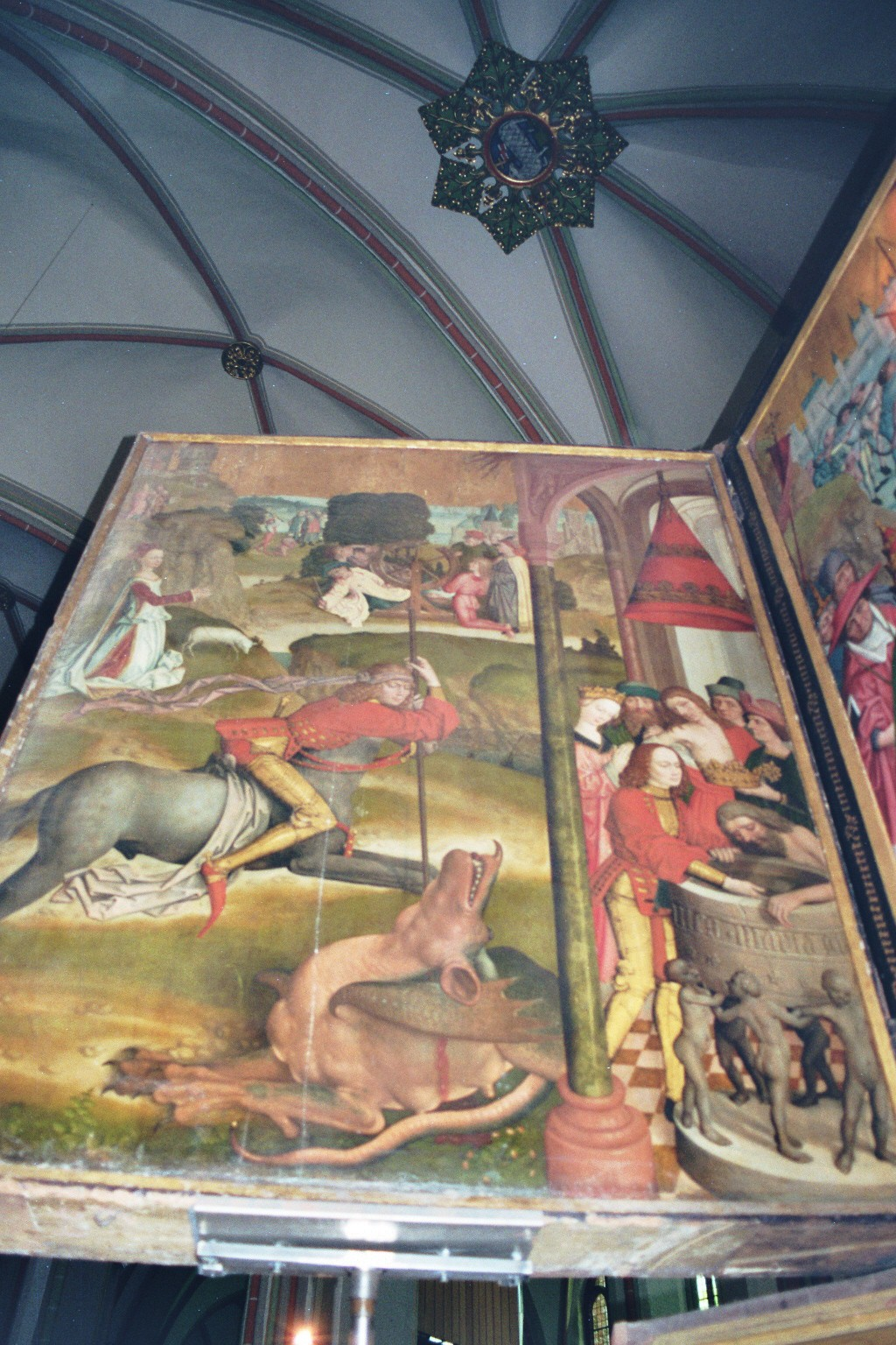 Lüneburg, St. Johannis, Hauptaltar, Tafel von Hinrik Funhof, 1482–1484: Legende des hl. Georg (Georg kämpft mit dem Drachen, tauft den König und das Volk, Georg wird ans Rad geflochten, Georg wird enthauptet)